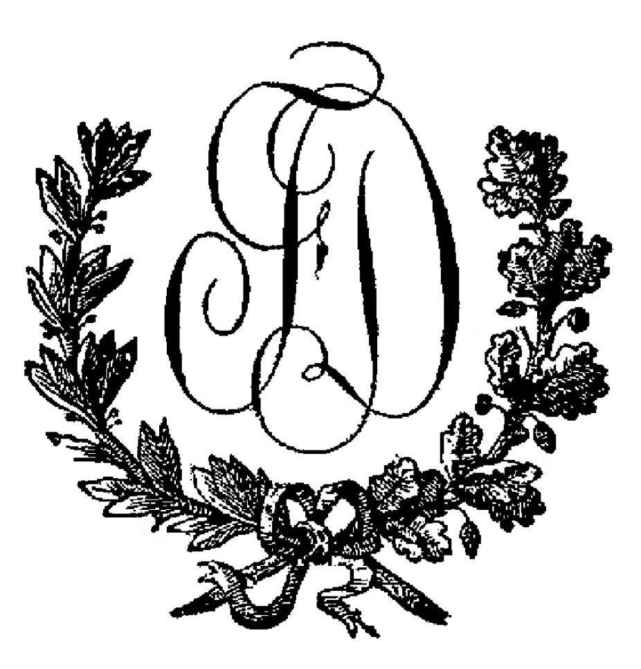 Logo de la maison d'édition Firmin Didot